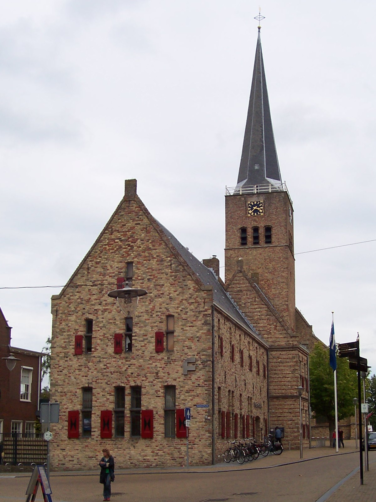 Frjentsjer, Camminghastins en Martinitsjerke